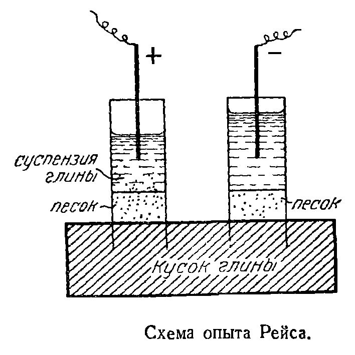 Схема опыта Рейсса